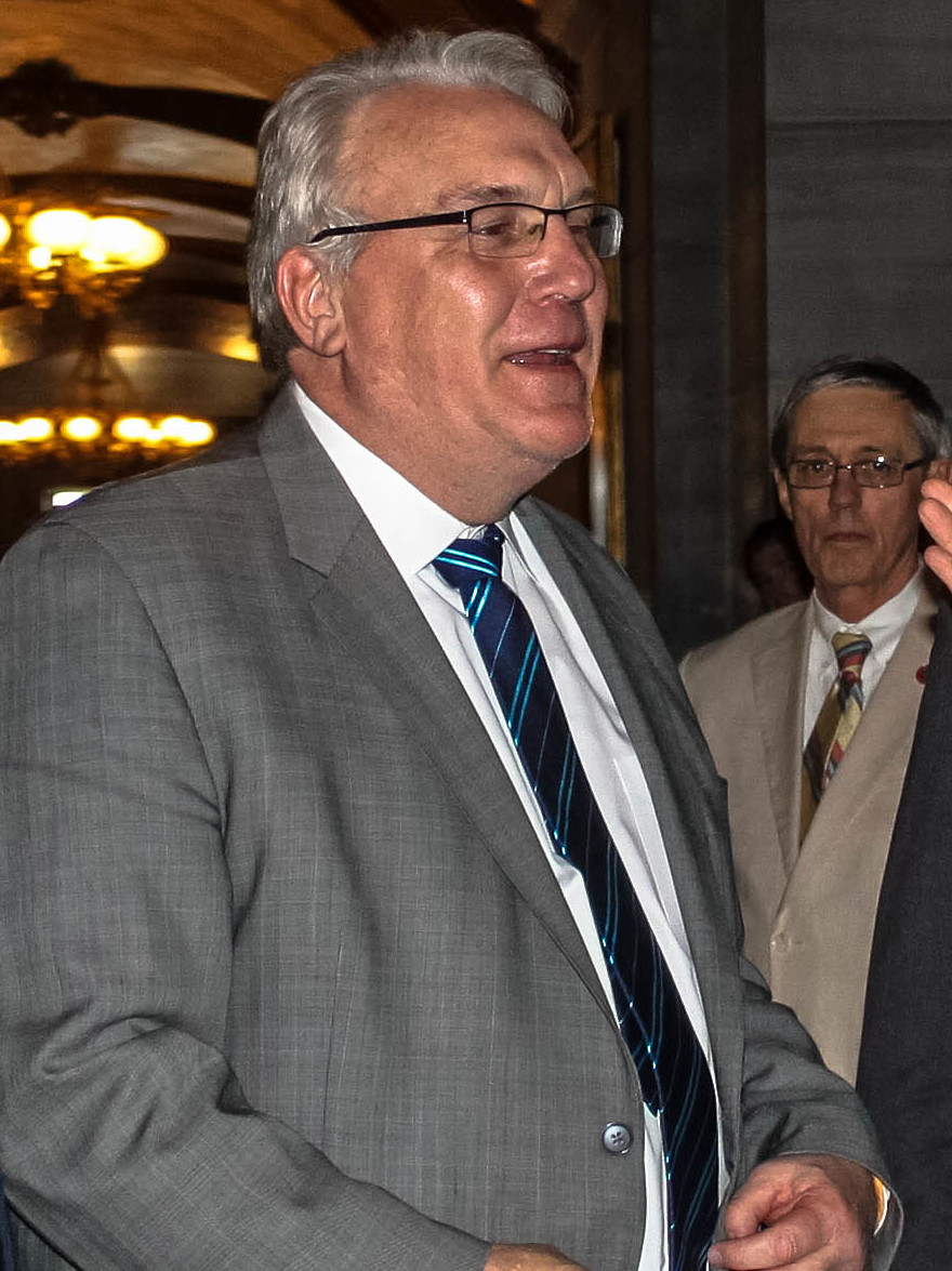 Mike Turner